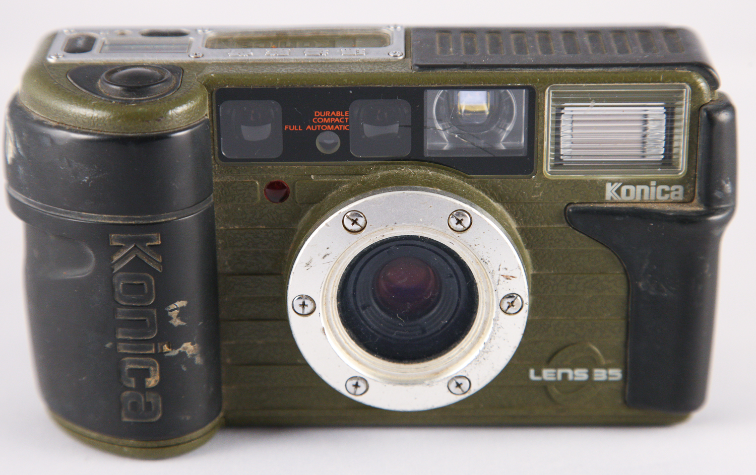 For Sale